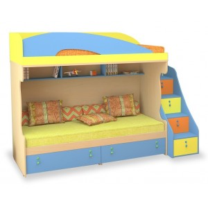 .......moje postýlka jako z katalogu.